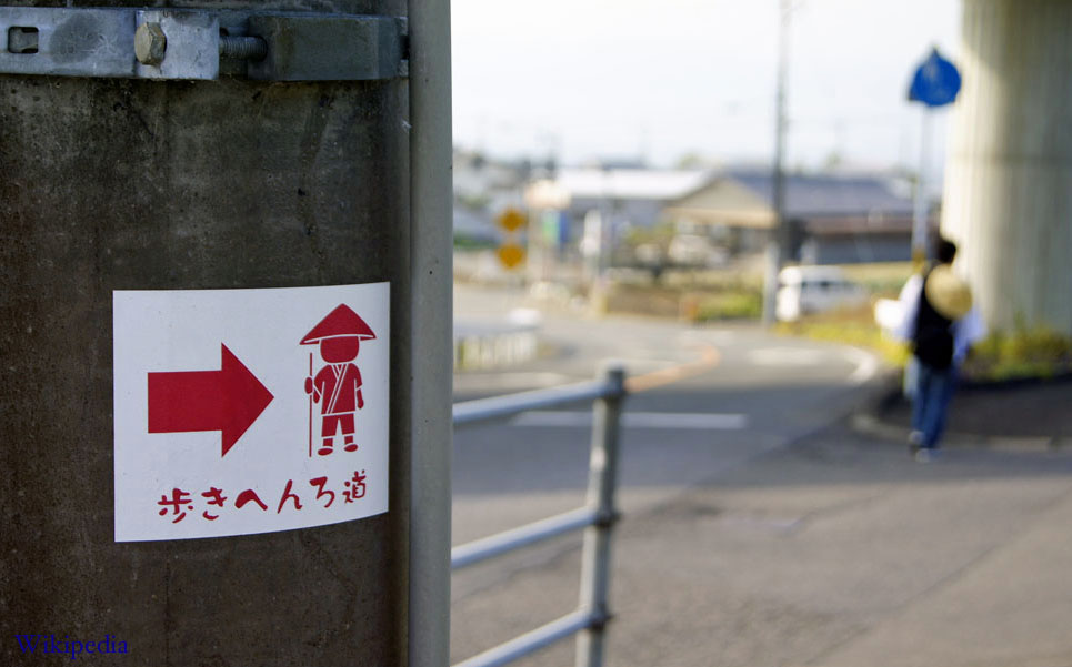 遍路のルート随所にある道しるべの一例。歩き遍路時に撮影。